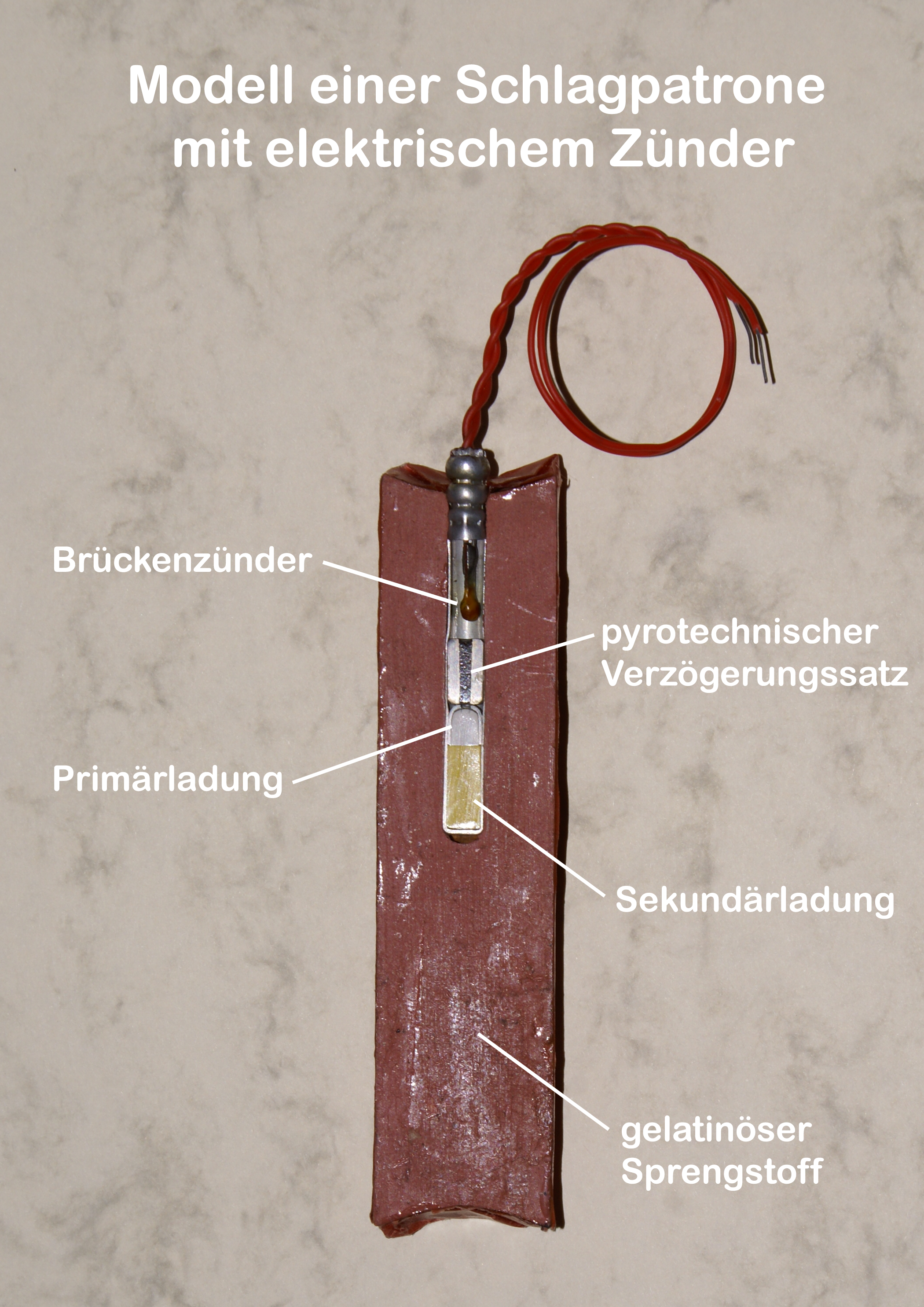 Modell einer Schlagpatrone.